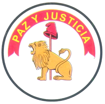 Escudo Reverso Paraguay